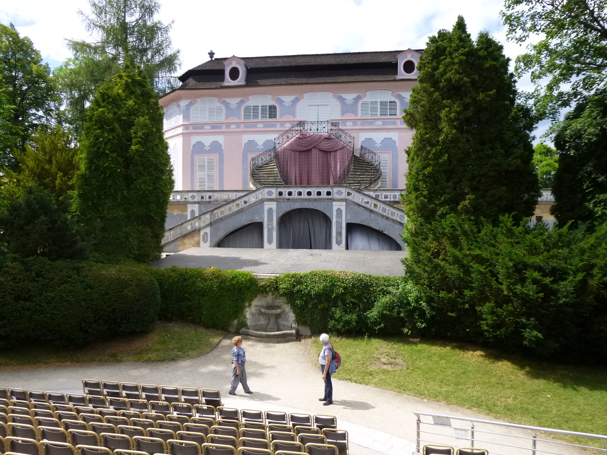 Im barocken Schlossgarten von Krummau finden während des Sommers diverse Musik- und Theateraufführungen statt. Die Zuschauertribüne ist drehbar.